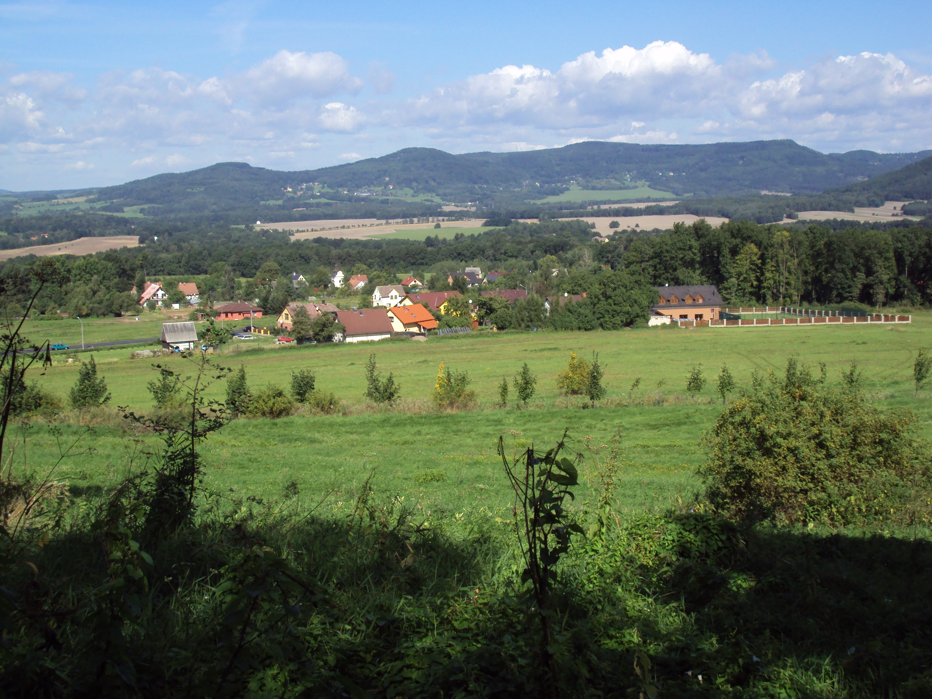 Původní Lada na okraji České Lípy, foceno z úpatí Špičáku skoro 1 km daleko